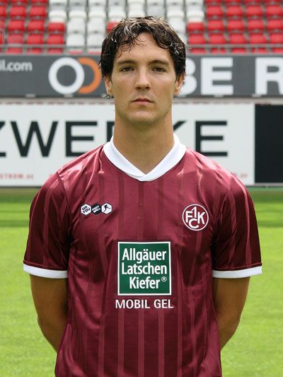 Srdjan Lakic, Fußballspieler